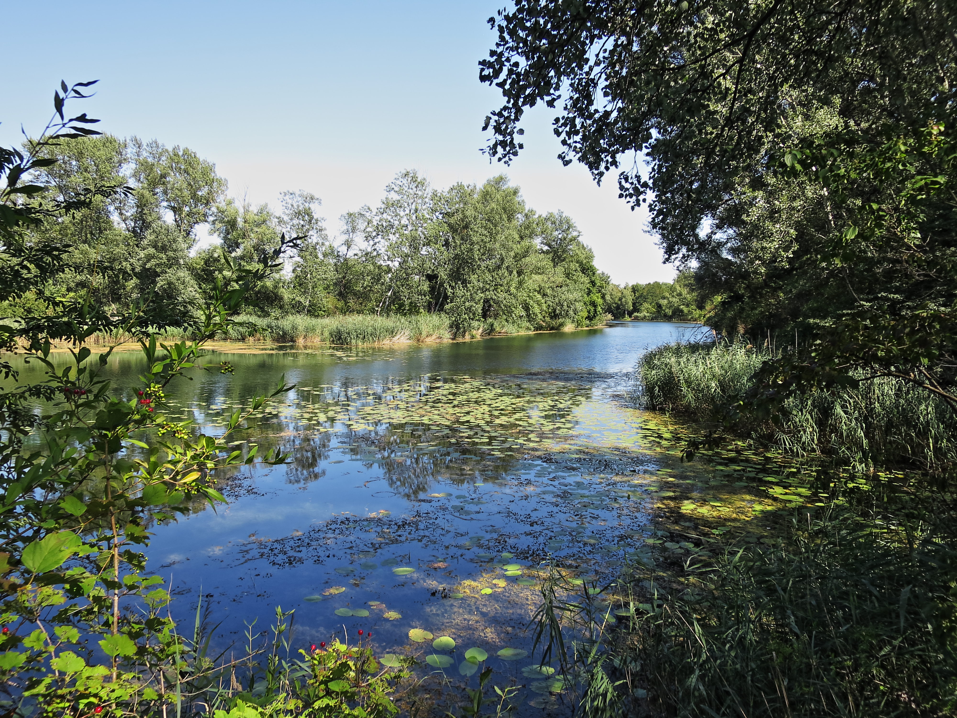 Schillerwasser in Wien-Donaustadt